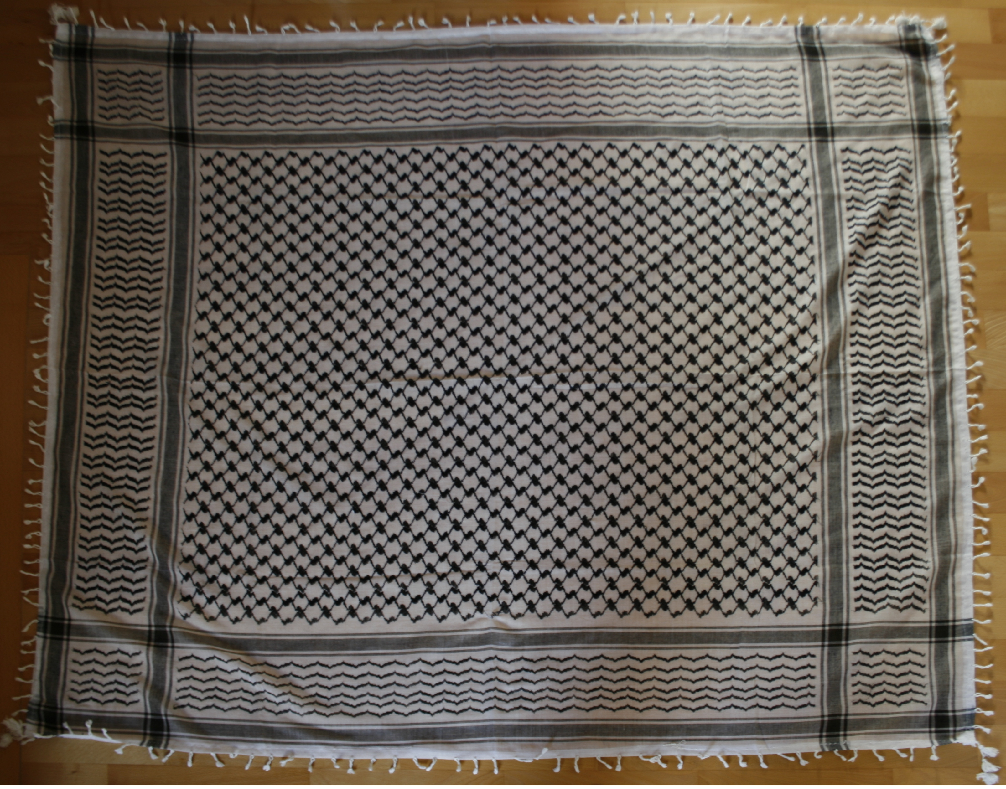 Keffieh palestinien noir et blanc classique Eʋegbe: Classical black and white palestinian keffiyeh